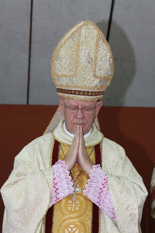 O Arcebispo Militar do Brasil, Dom Osvino José Both